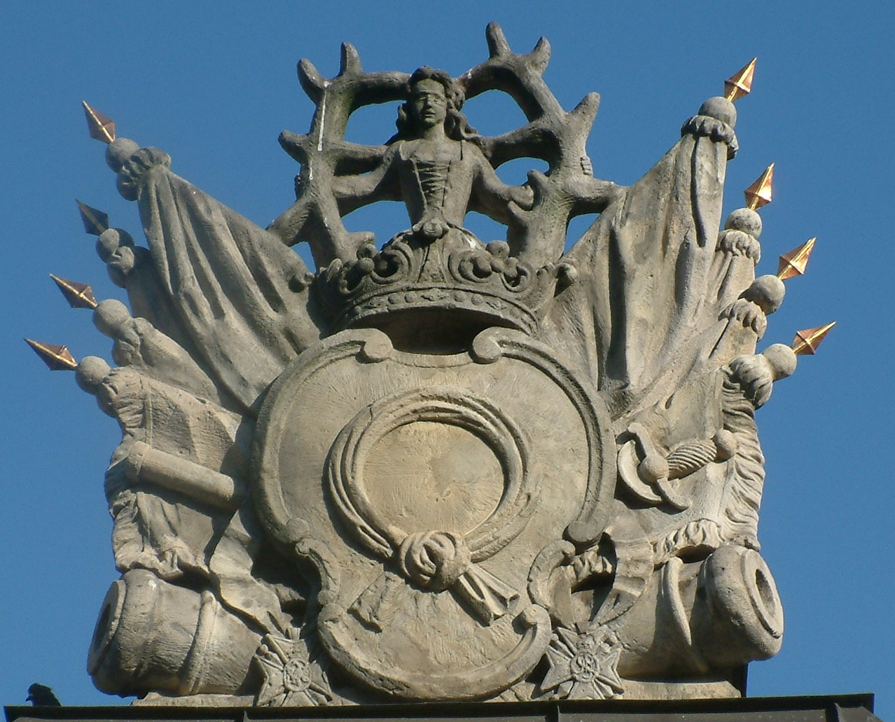 Nałęcz Coat of Arms of Kazimierz Raczyński, Guard House, Poznań